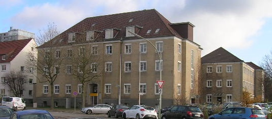 Ehemaliges Finanzamt des Landkreises Wesermünde in Geestemünde.